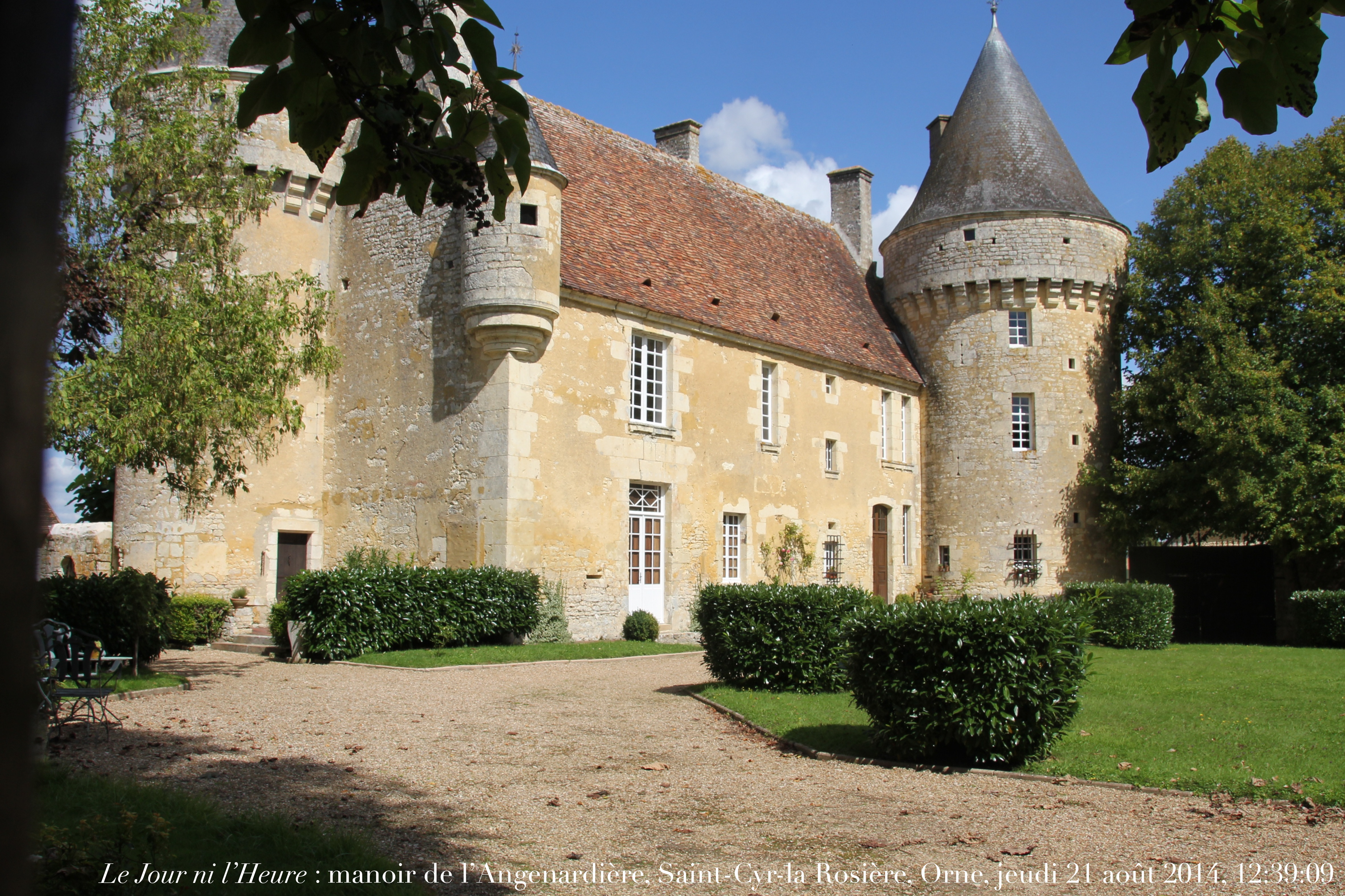 Site de Renaud Camus : bio-bibliographie, journal , Le Jour ni l’Heure, chronologie, livres & textes en ligne (librairie/bookshop) , site du château de Plieux (histoire, description, conditions de visite), tableaux , etc.